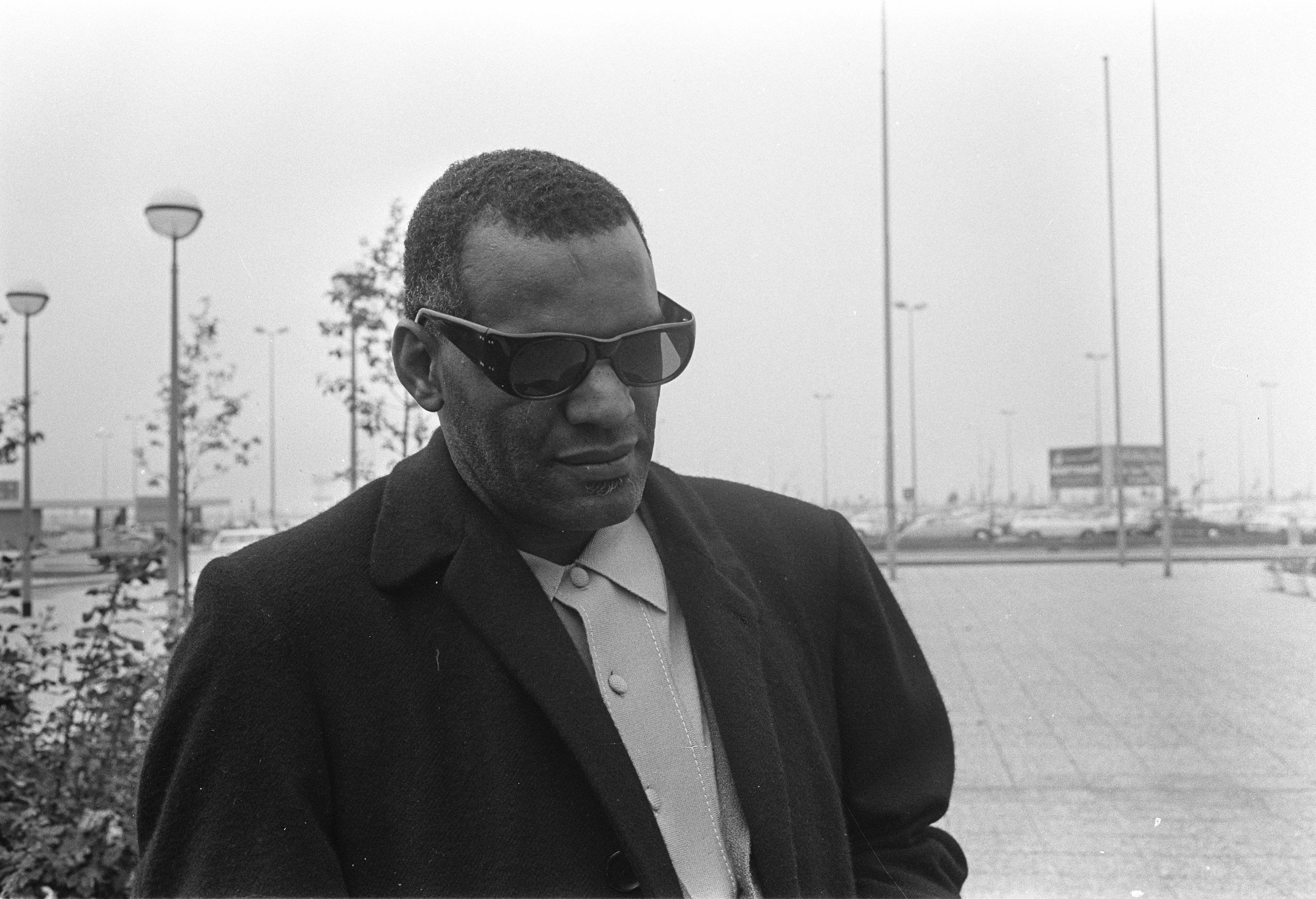 Collectie / Archief : Fotocollectie Anefo Reportage / Serie : [ onbekend ] Beschrijving : Aankomst Ray Charles (kop) op Schiphol Ray Charles Datum : 5 oktober 1968 Locatie : Noord-Holland, Schiphol Trefwoorden : KOPPEN, aankomsten Persoonsnaam : Charles, Ray Fotograaf : Koch, Eric / Anefo Auteursrechthebbende : Nationaal Archief Materiaalsoort : Negatief (zwart/wit) Nummer archiefinventaris : bekijk toegang 2.24.01.05 Bestanddeelnummer : 921-7411